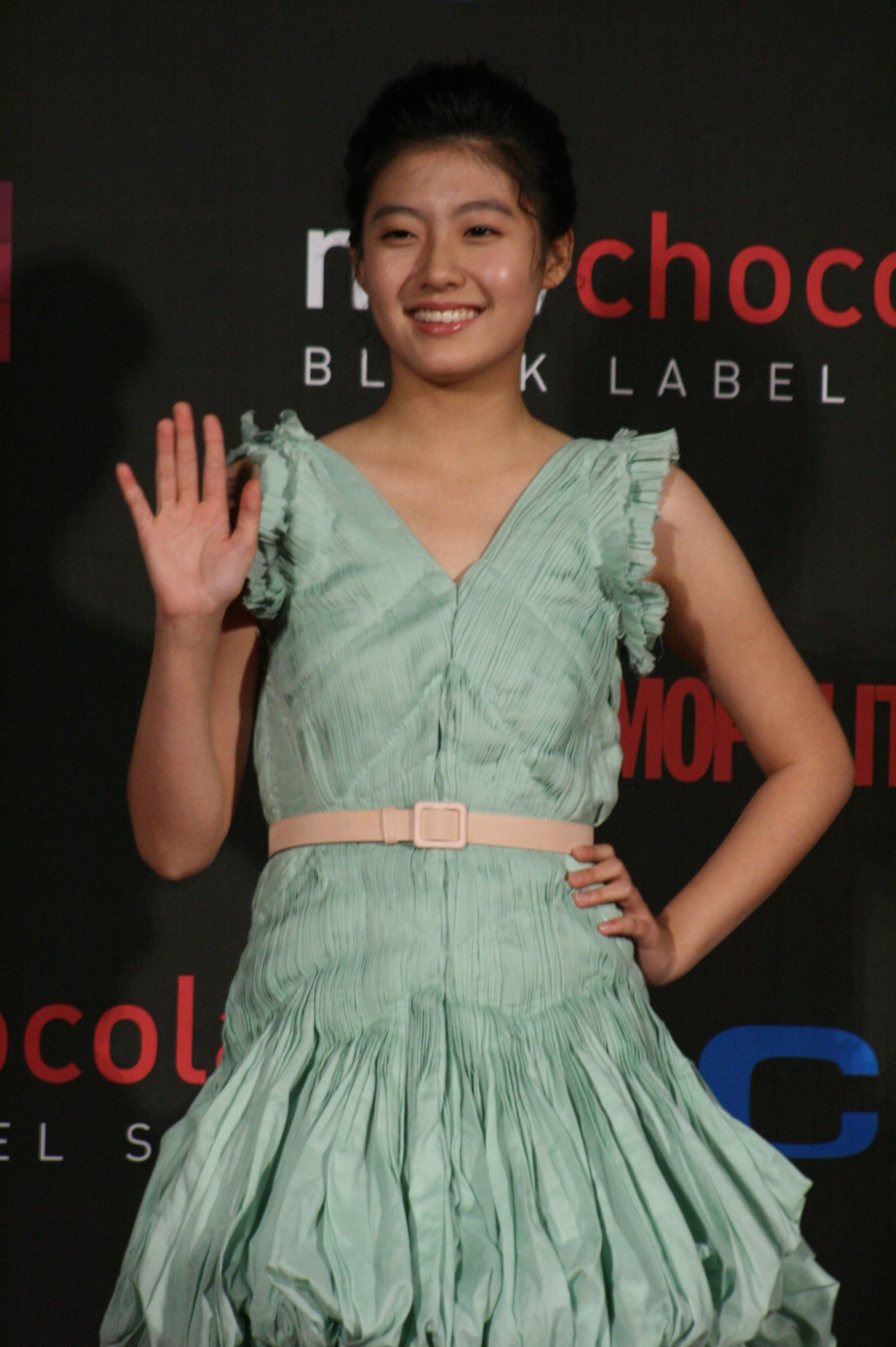 2009 스타일아이콘어워즈에서의 남지현.